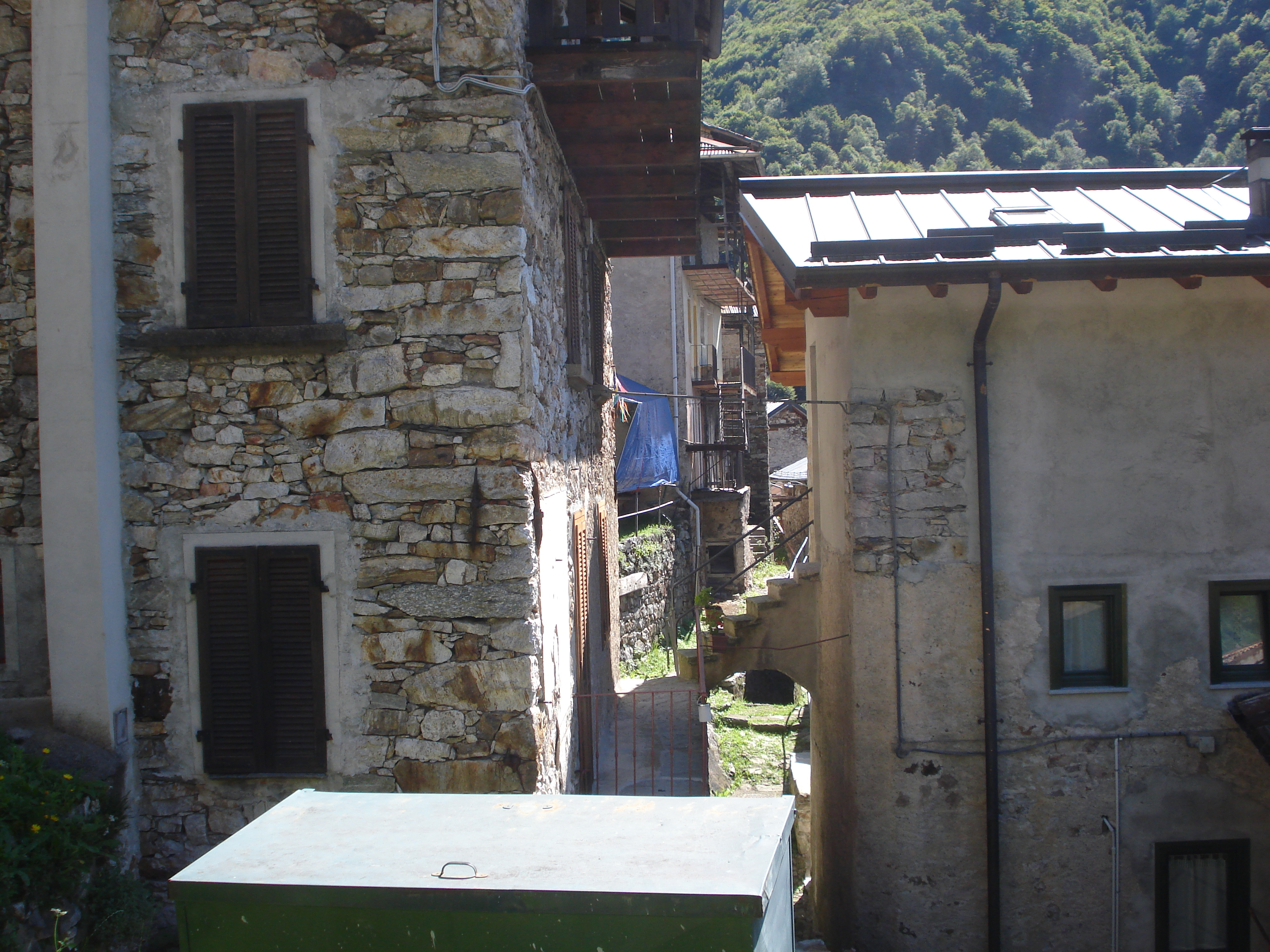 Comune di Sabbia, Vercelli